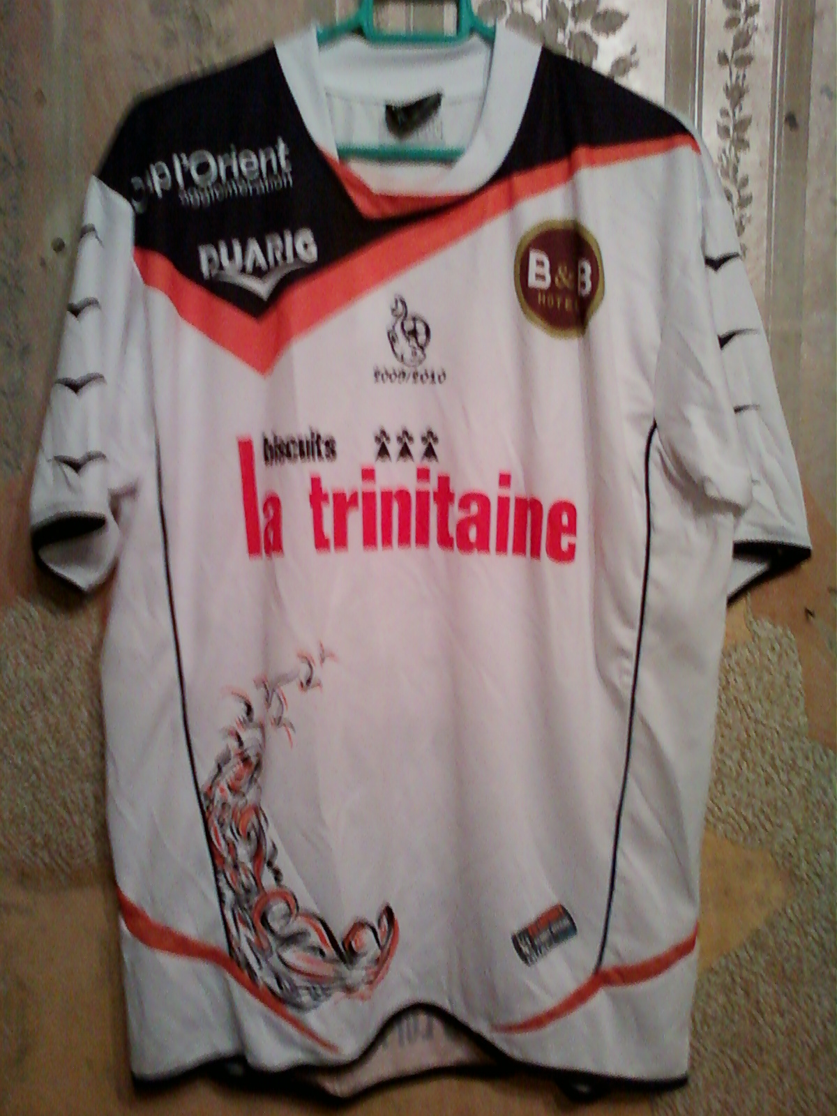 Maillot extérieur du FC Lorient lors de la saison 2009-2010